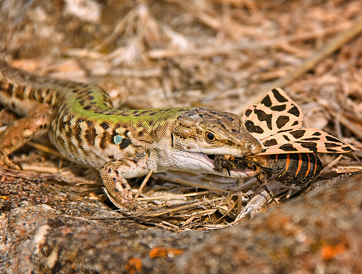 Eidechse mit Beute Monte Argentario 2011